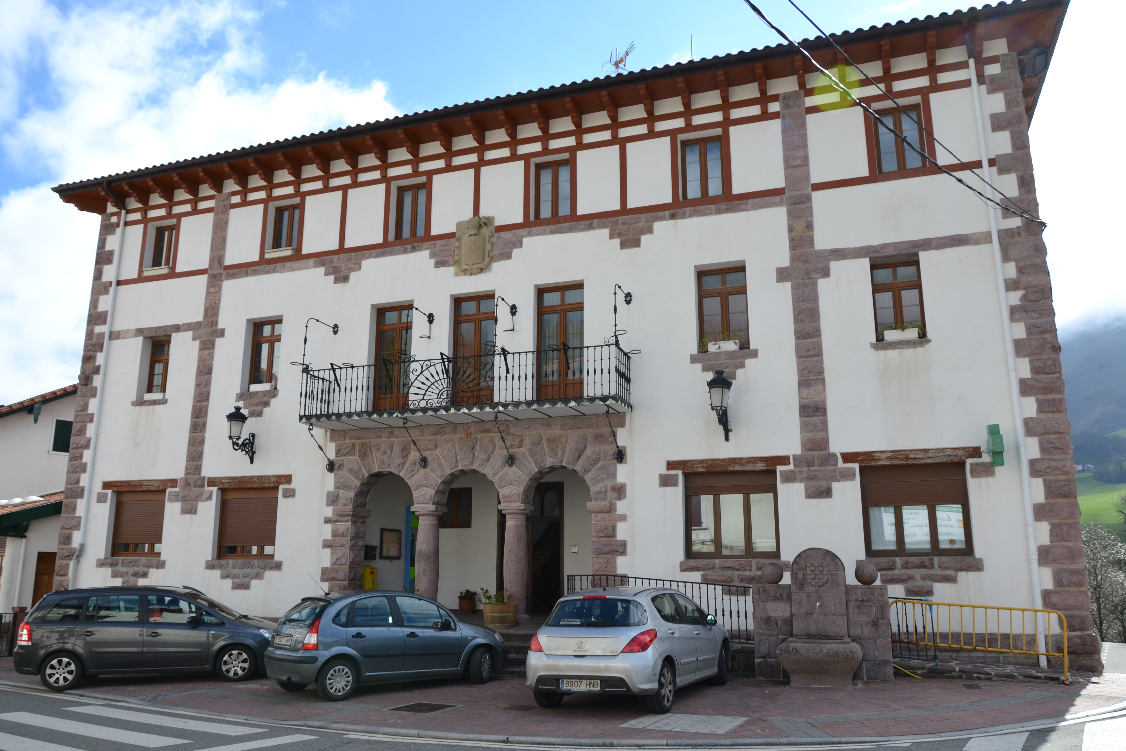 maison commune de Valcarlos